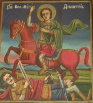 Икона на Св. Димитриј во манастирската црква Св. Илија во прилеоско Пештани